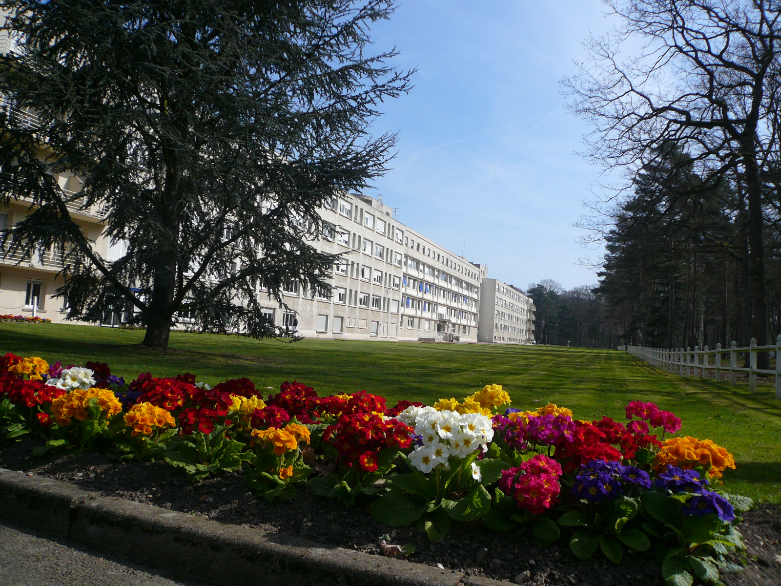 Une vue extérieure ensoleillée et fleurie de l'hopital La Musse